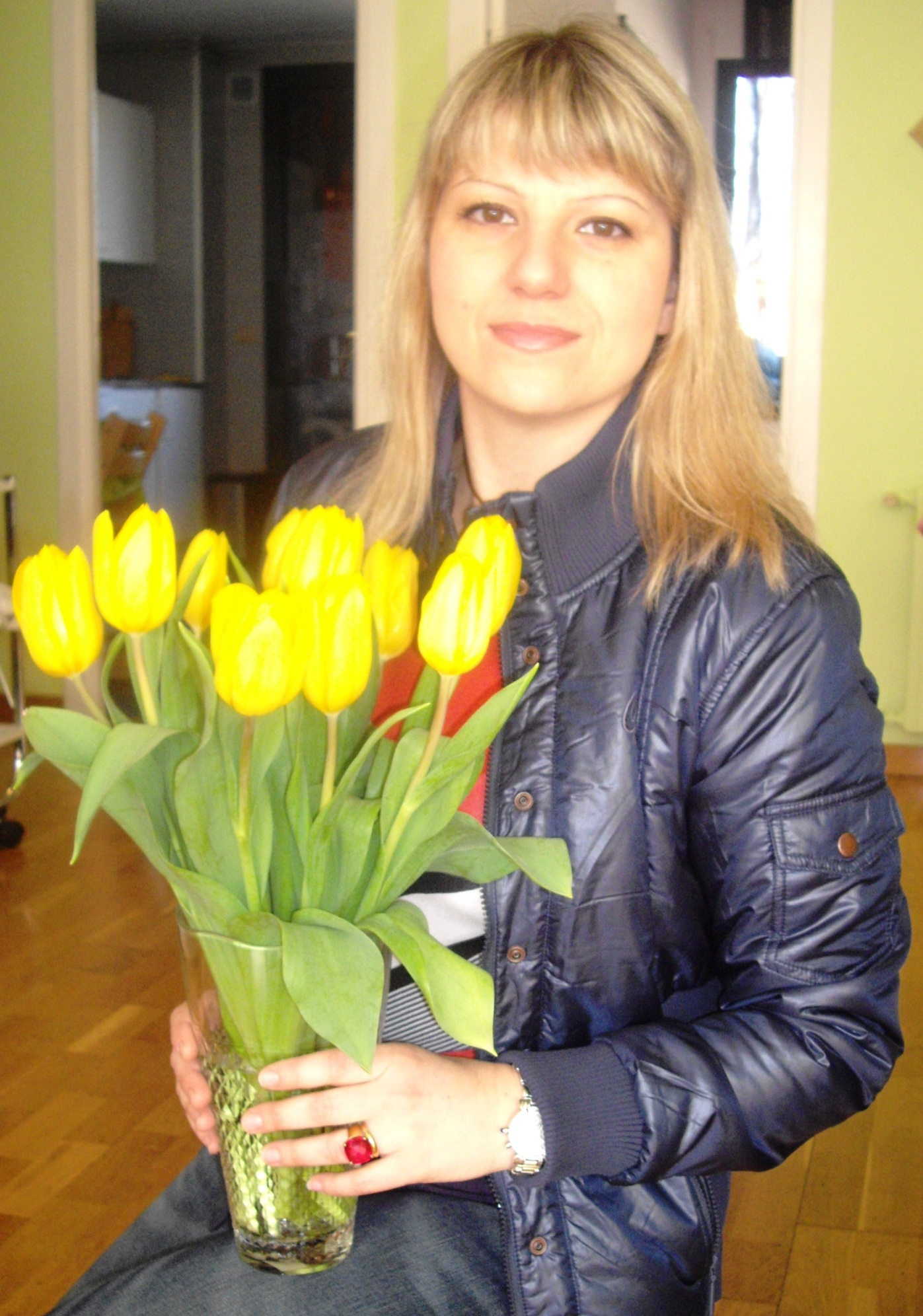 Olga Alexandrova, Gran Maestra de ajedrez, España. Barcelona, 2012